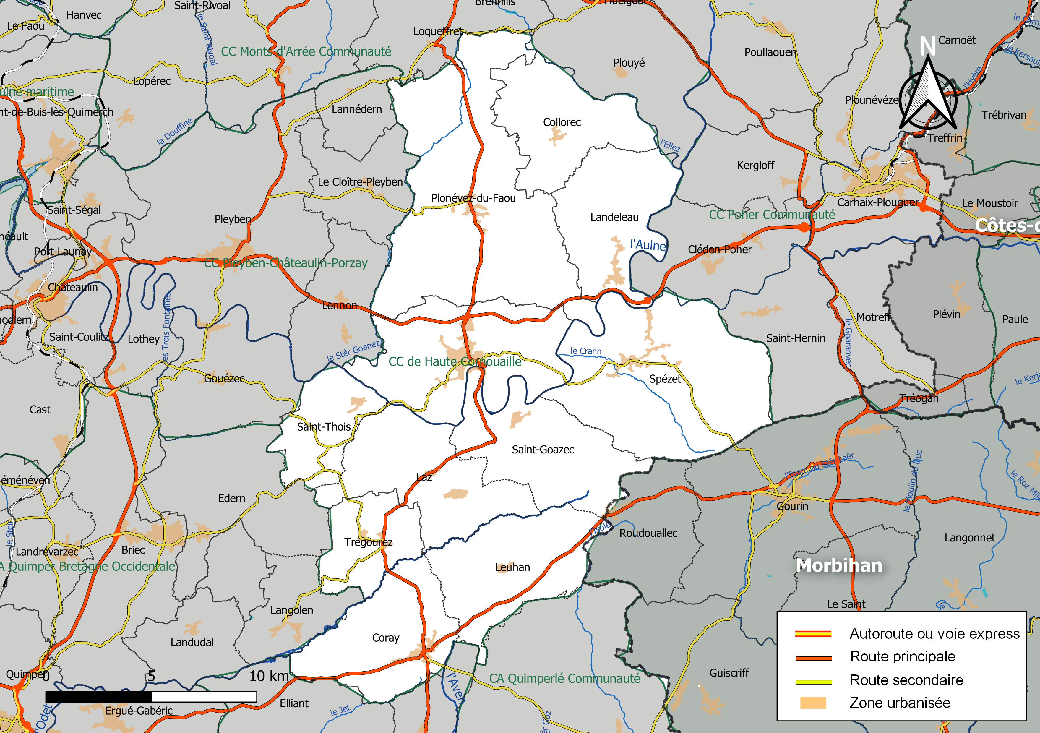 Carte géographique de la Communauté de communes de Haute Cornouaille, département du Finistère, France. Composition au 1er janvier 2019.